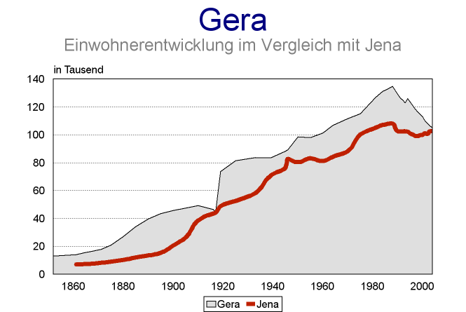 Einwohnerentwicklung von Gera im Vergleich mit Jena. Datenreihe 1852 13.062 1861 14.200 7.000 1864 15.400 7.200 1867 16.400 7.500 1871 17.871 8.260 1875 20.810 9.020 1880 27.118 10.337 1885 34.152 12.017 1890 39.599 13.449 1895 43.544 15.390 1900 45.640 20.677 1905 47.455 26.400 1910 49.276 38.487 1916 46.515 43.560 1917 44.851 44.117 1919 73.700 48.847 1925 81.402 52.649 1933 83.775 58.357 1939 83.436 70.632 1945 88.139 76.266 1946 89.212 82.722 1950 98.576 80.309 1955 98.014 83.073 1960 101.373 81.190 1964 106.838 84.307 1970 111.535 88.130 (Volkszählung 1. Januar 1971) 1975 115.238 100.180 1981 126.792 104.946 1984 131.313 107.062 1985 131.843 107.401 1988 134.834 108.010 1990 129.037 102.518 1991 126.521 1992 124.925 1993 122.974 1994 126.035 102.204 1995 123.555 101.061 1996 121.156 100.278 1997 118.733 99.273 1998 116.419 99.095 1999 114.718 99.779 2000 112.835 99.893 2001 109.926 101.157 2002 108.082 100.542 2003 106.365 102.634 2004 105.153 102.442